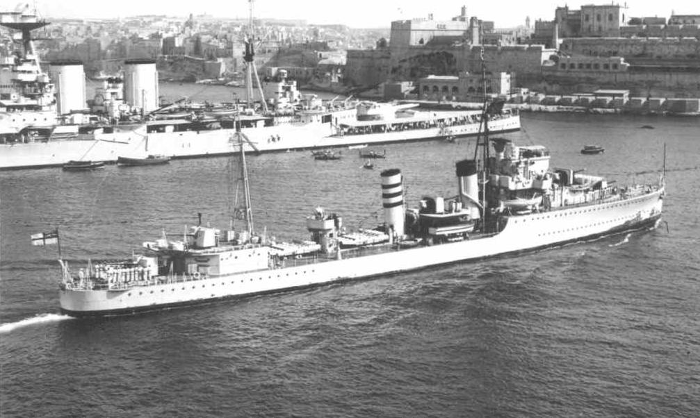 Der britische Flottillenführer HMS INGLEFIELD